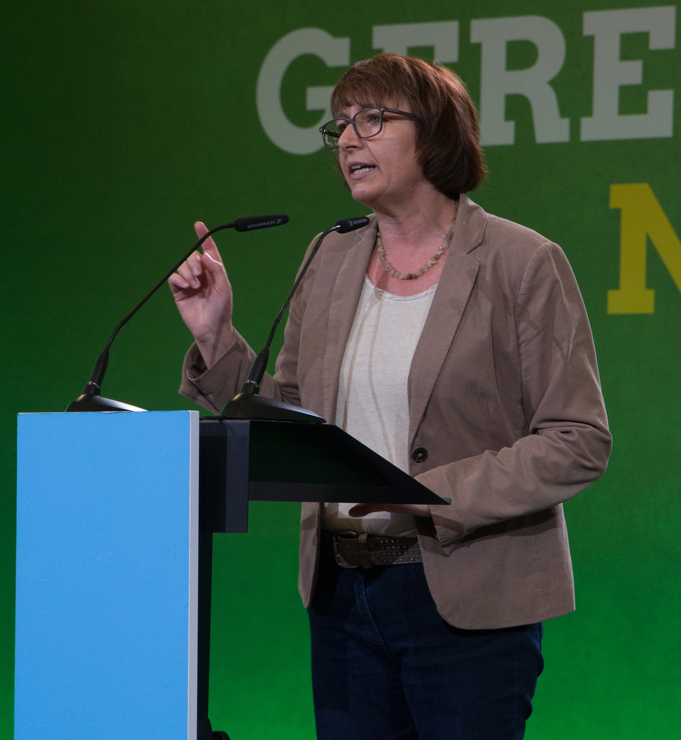 Monika Düker im Rahmen des Länderrates der GRÜNEN am 17. September 2017 in Berlin (Gasometer Schöneberg)